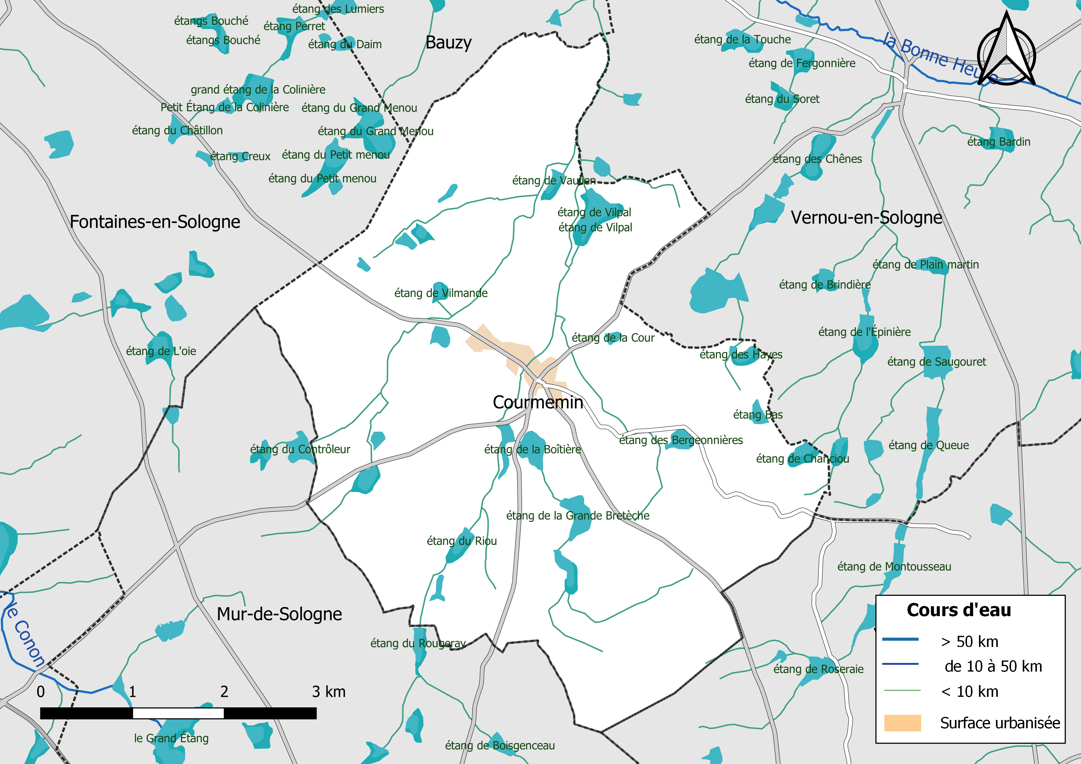 Carte du réseau hydrographique de la commune de Courmemin (Loir-et-Cher, France).